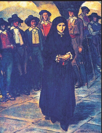 “Arratiarrak”, Alberto Arrue